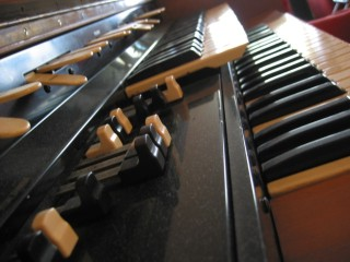 Hammond L100 met drawbars Foto van mijn Hammond. De karakteristieke drawbars om het geluid samen te stellen een beetje op de voorgrond genomen zodat deze duidelijk zijn. categorie:afbeelding muziekinstrument Image:Hammond organ.jpg